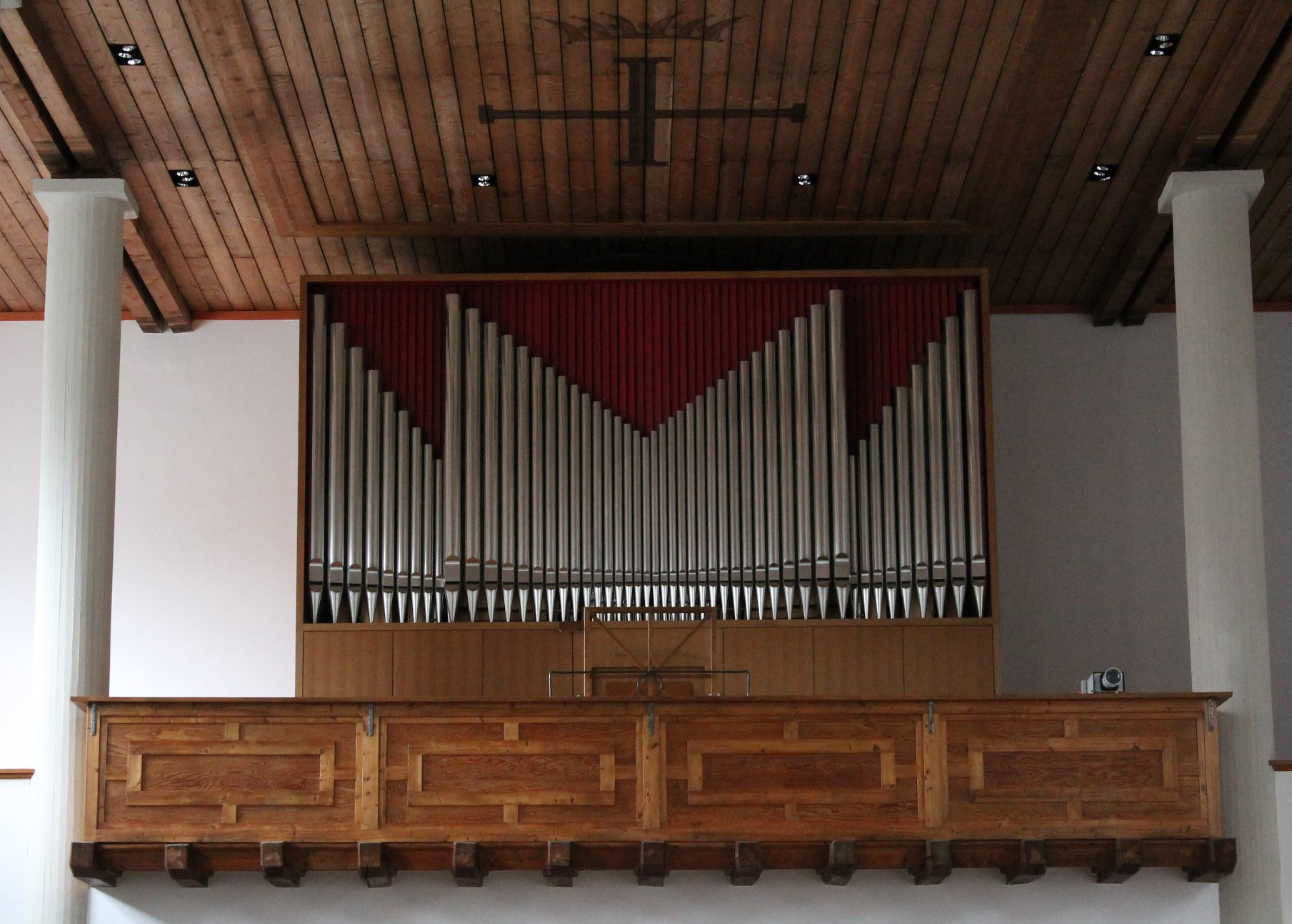 Orgel von Heilig Blut in München-Bogenhausen